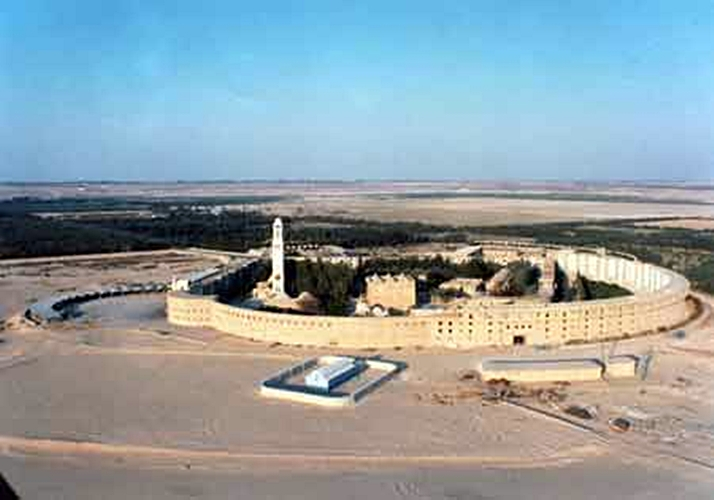 صورة جوية لدير الأنبا مقار، تذكار من الدير